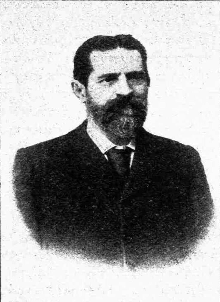 Griechischer Politiker und Zeitungsverleger, 19. Jahrhundert